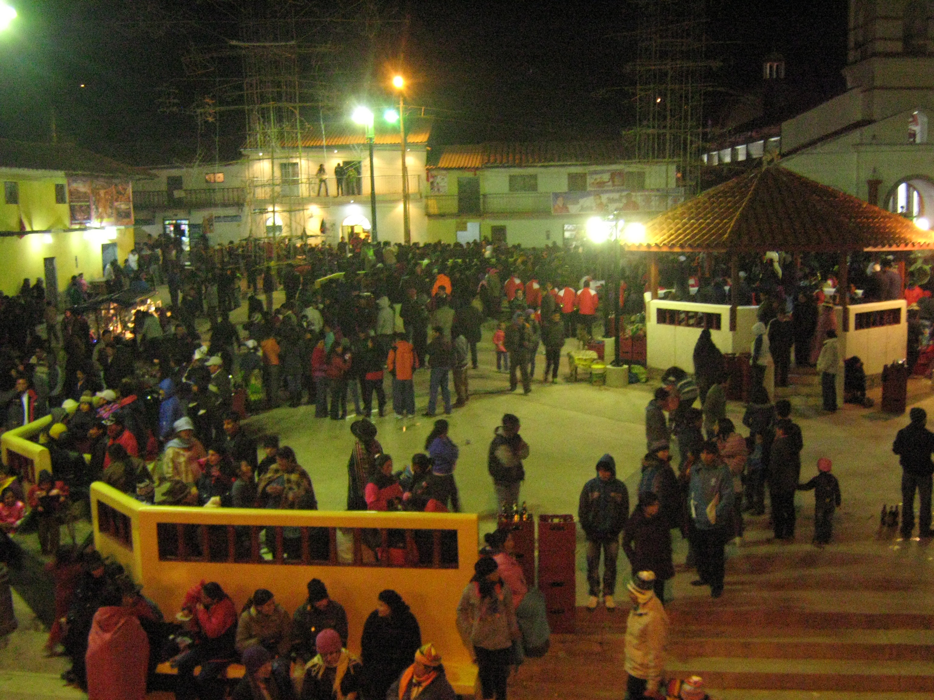 Fiesta del Señor de los Burgos (Septiembre)12, 13, 14, 15 y 16